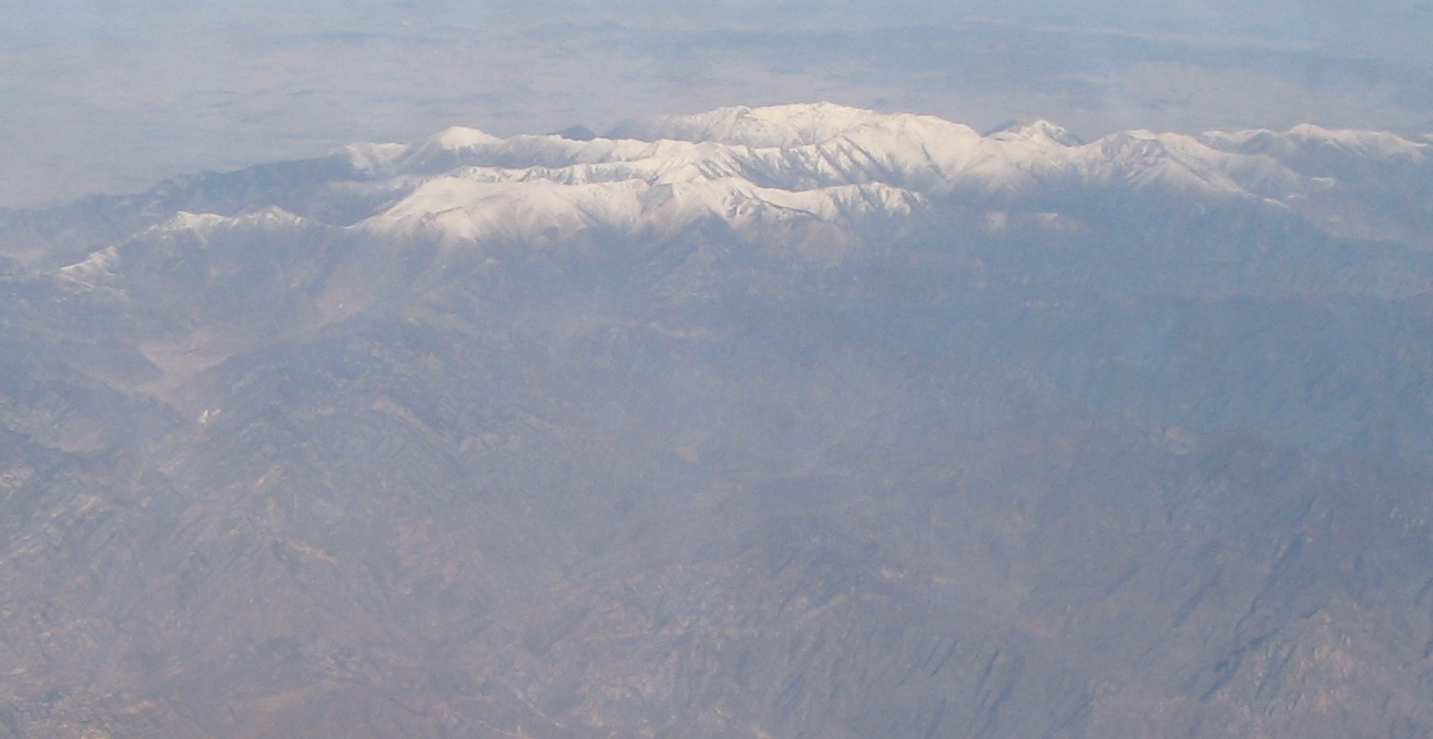 Information sur l'endroit d'où a été prise la photo : N39 19.363 E114 50.873. Les montagnes du Hébĕi (河北) et du Shānxī (山西) près de Láiyuán (涞源), vue vers le nord. Le massif au centre est le Wutai Shan (五台山), une des quatre montagnes sacrées bouddhiques de Chine qui culmine à 3 058 m au pic Yedou